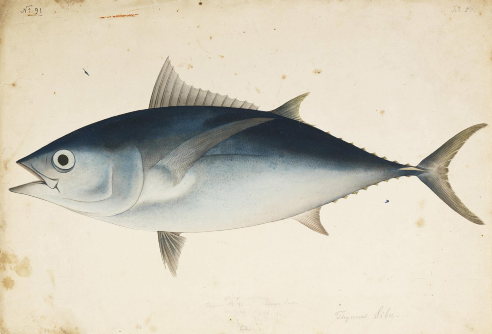 Thunnus obesus Lowe